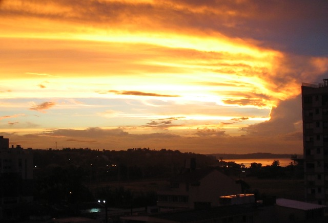 Porto Alegre sunset